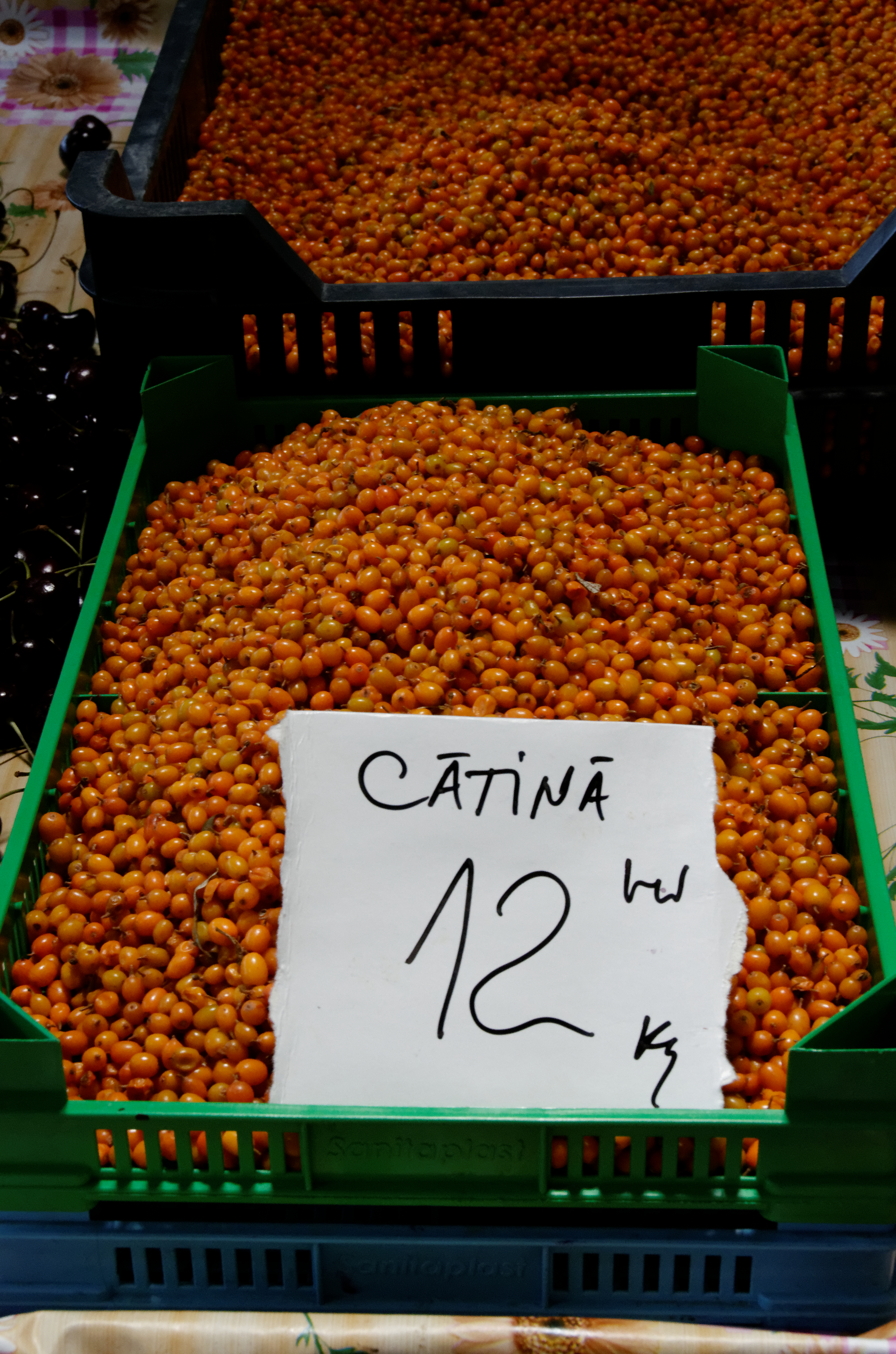 Baies d'argousier (Hippophae rhamnoides) vendu sur un marché (Piața Matache) de Bucarest.